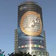 NBS Bratislava